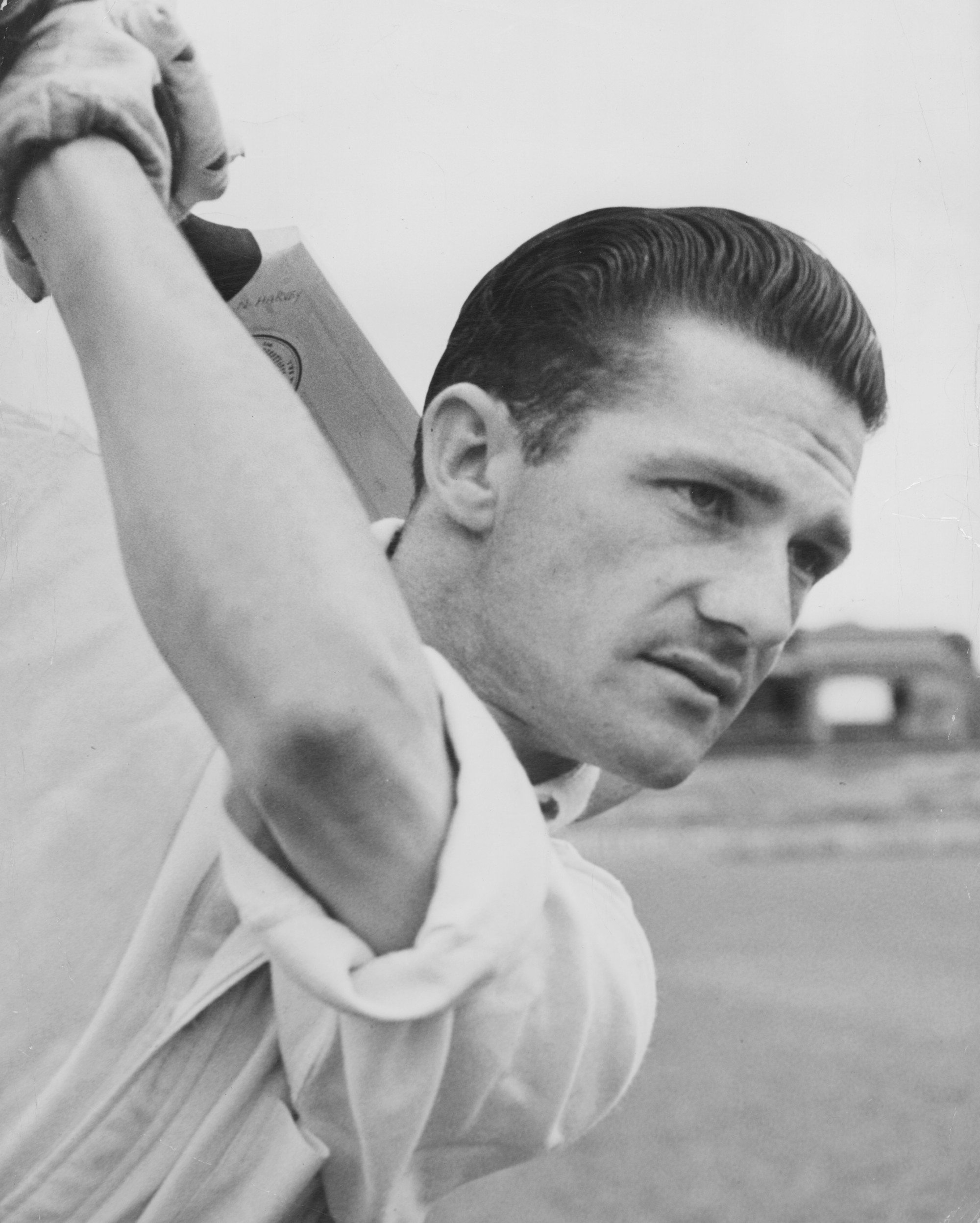 Neil Harvey